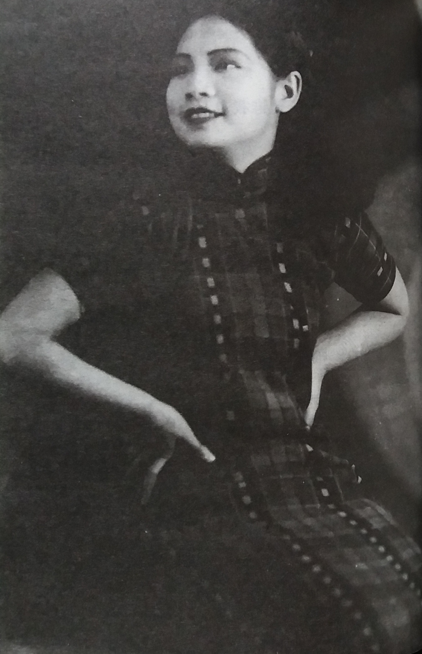 中国1930年代女演员王人美